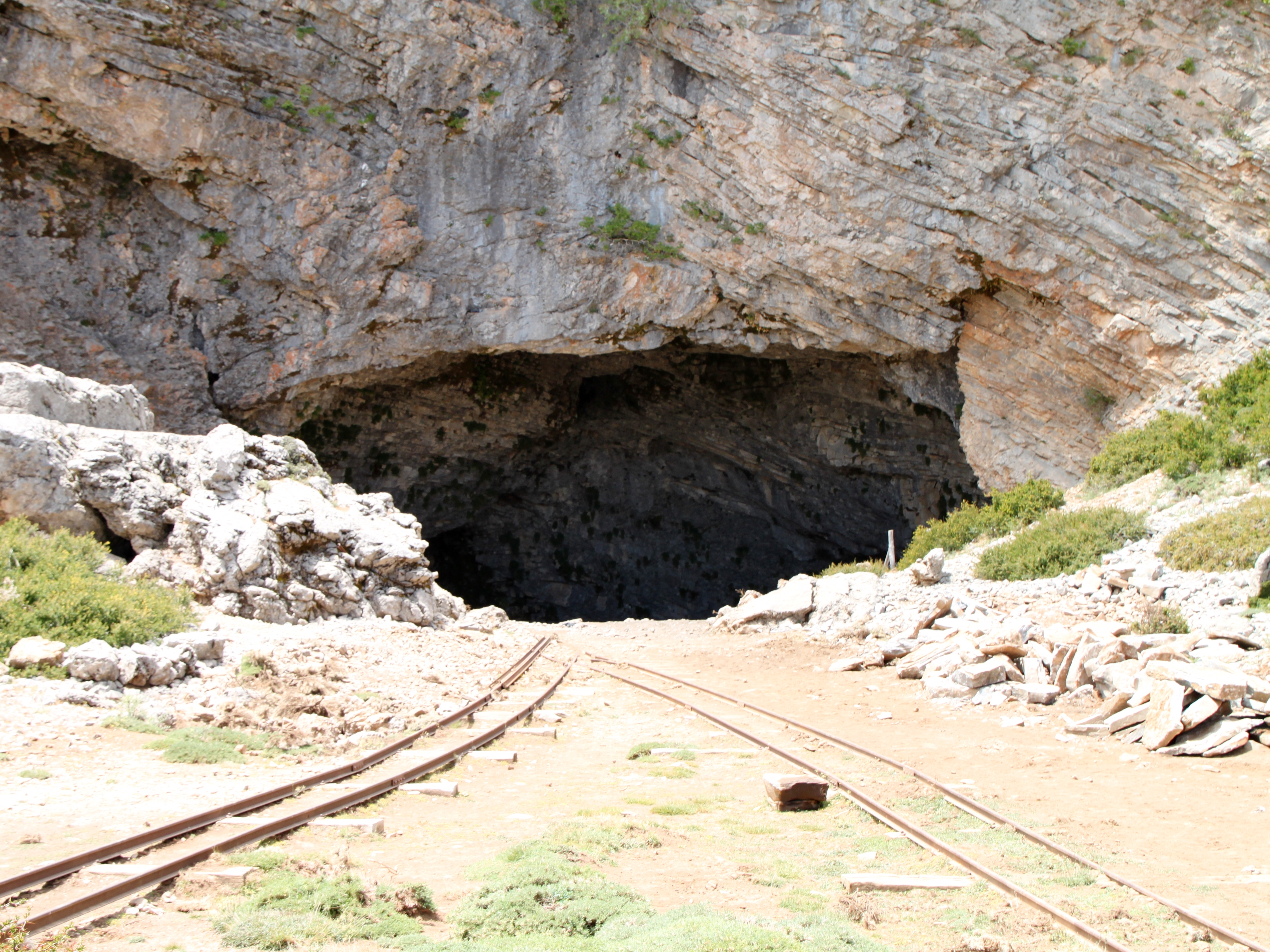 Idäische Grotte an der Nida-Hochebene, Gemeinde Anogia, Präfektur Rethymno, Kreta, Griechenland